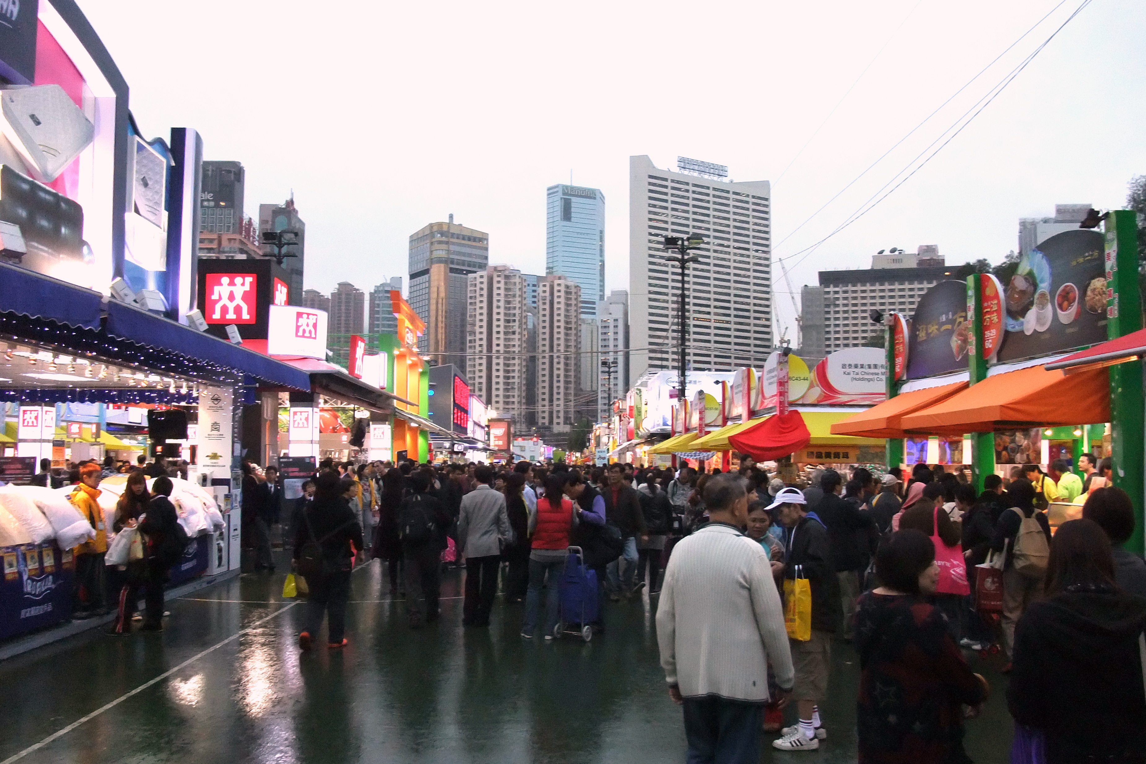 中文（香港）: 第45屆工展會場內